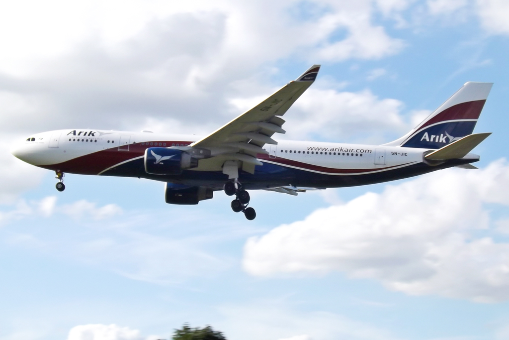 5N-JIC A330 Arik